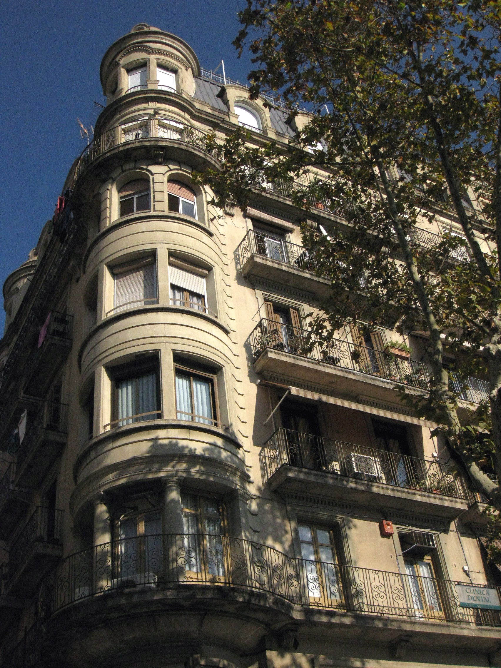 Casa Martí-Ventosa, edifici de Manuel Puig Janer del 1935, d'estil eclèctic afrancesat, al barri de la Barceloneta (Barcelona). Vista de la façana principal, al passeig de Joan de Borbó, núm. 22-23, amb la tribuna cantonera semicircular.